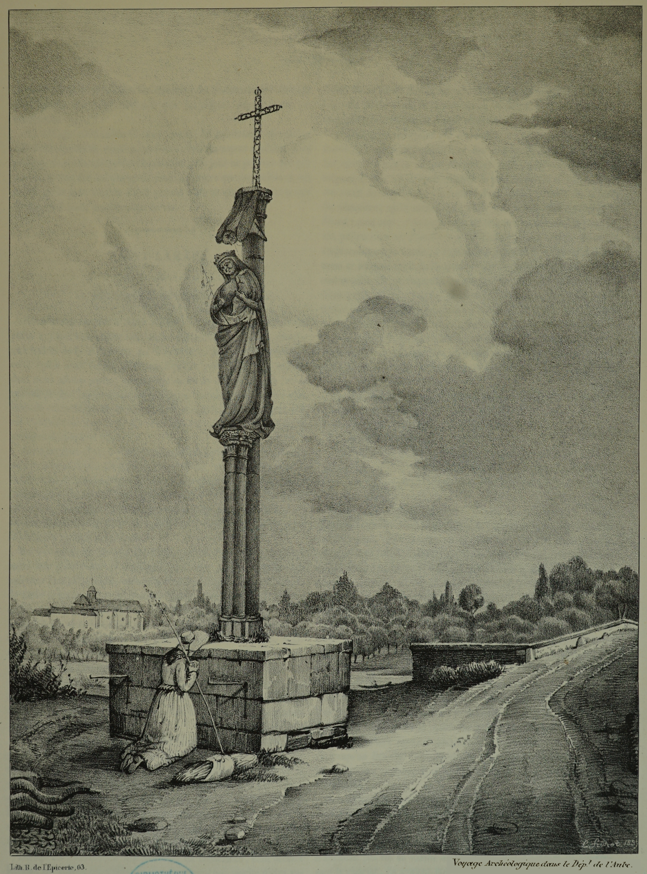 dessin dans le livre de Arnaud.